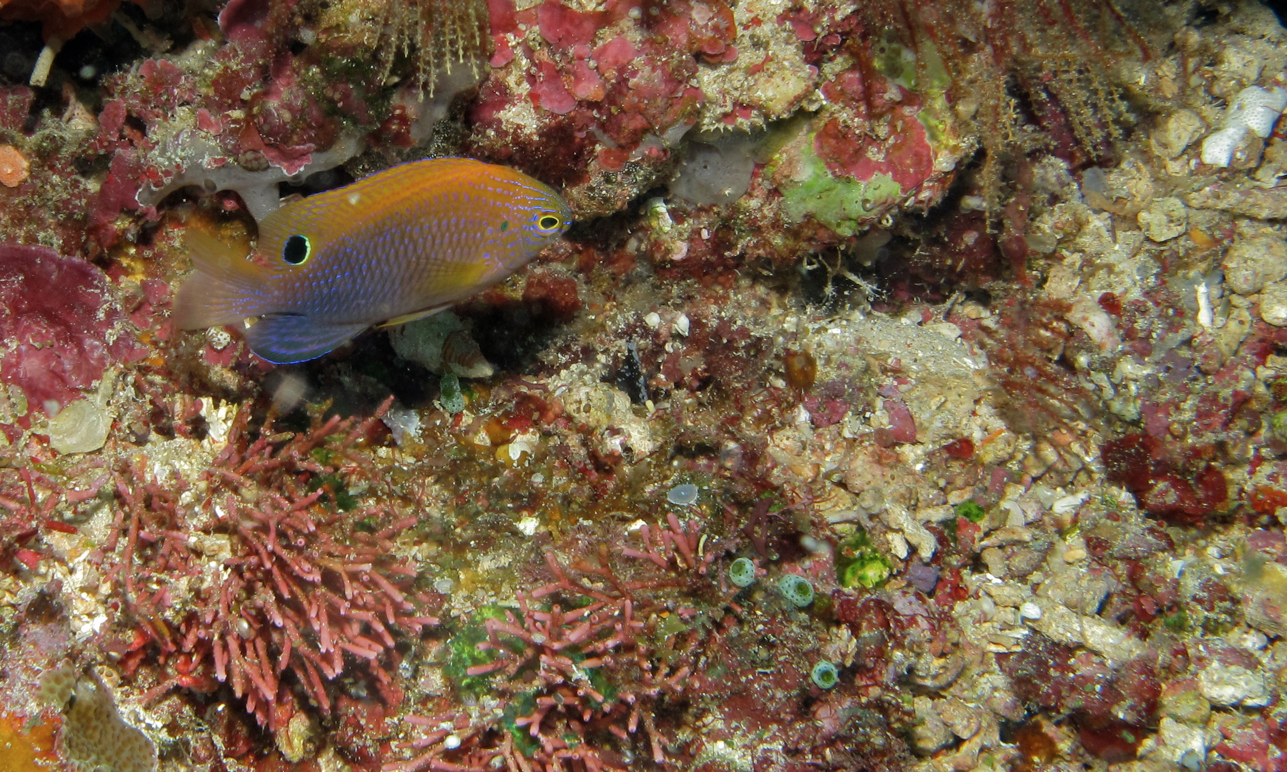 Mike's Point, Bunaken Island, Sulawesi, INDONESIA